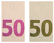 Erkennung der Ovi-Technik auf einer 50 Euro Banknote (Original text: Erkennung der Ovi-Technik auf einer 50 Euro Banknote)